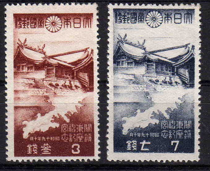 Japan stamp（戦時中の日本記念切手）日本が中国の旅順（現在の大連市旅順区）に鎮座した関東神宮を記念する切手。現存しない